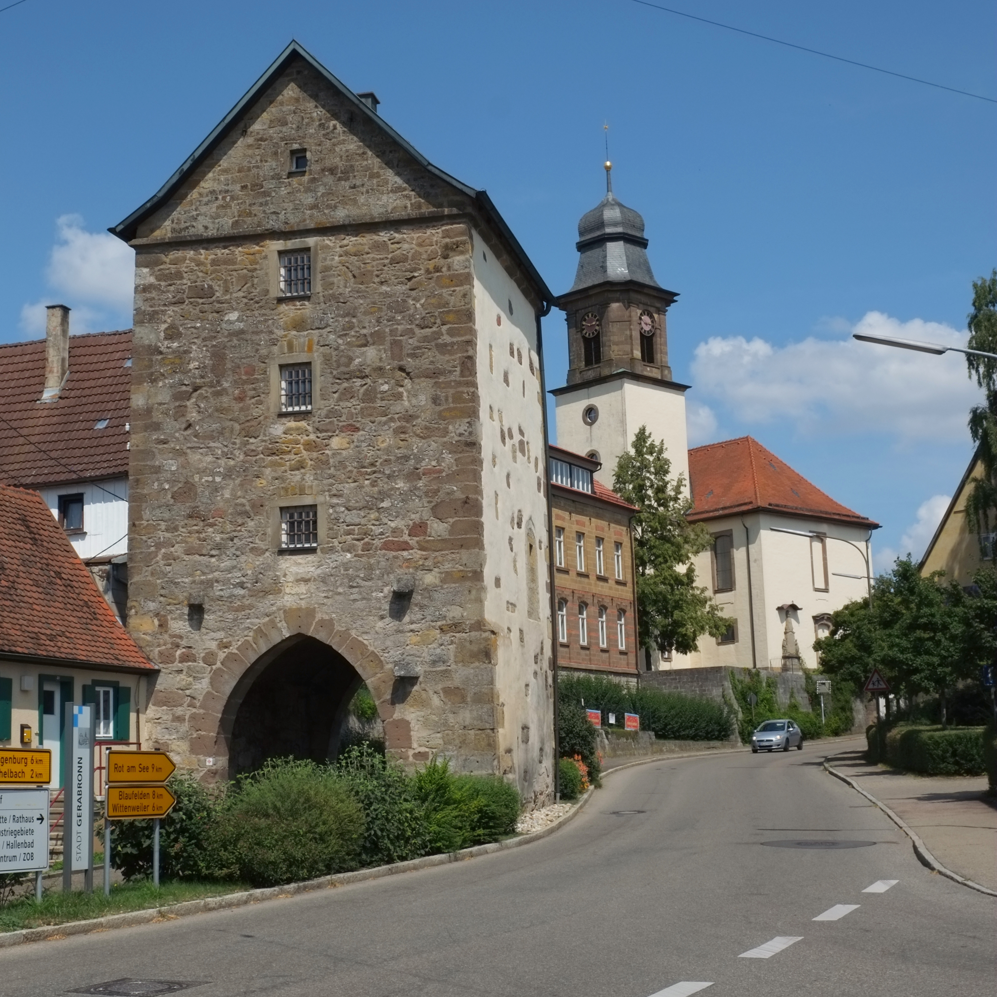 Gerabronn im Landkreis Schwäbisch Hall (Baden-Württemberg, Deutschland)